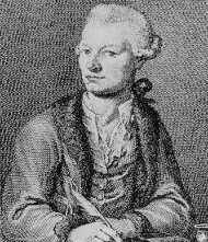 Porträt von Gottlieb Stephanie dem Jüngeren (1741–1800). Kupferstich von Johann Ernst Mansfeld nach einem Gemälde von Joseph Lange.